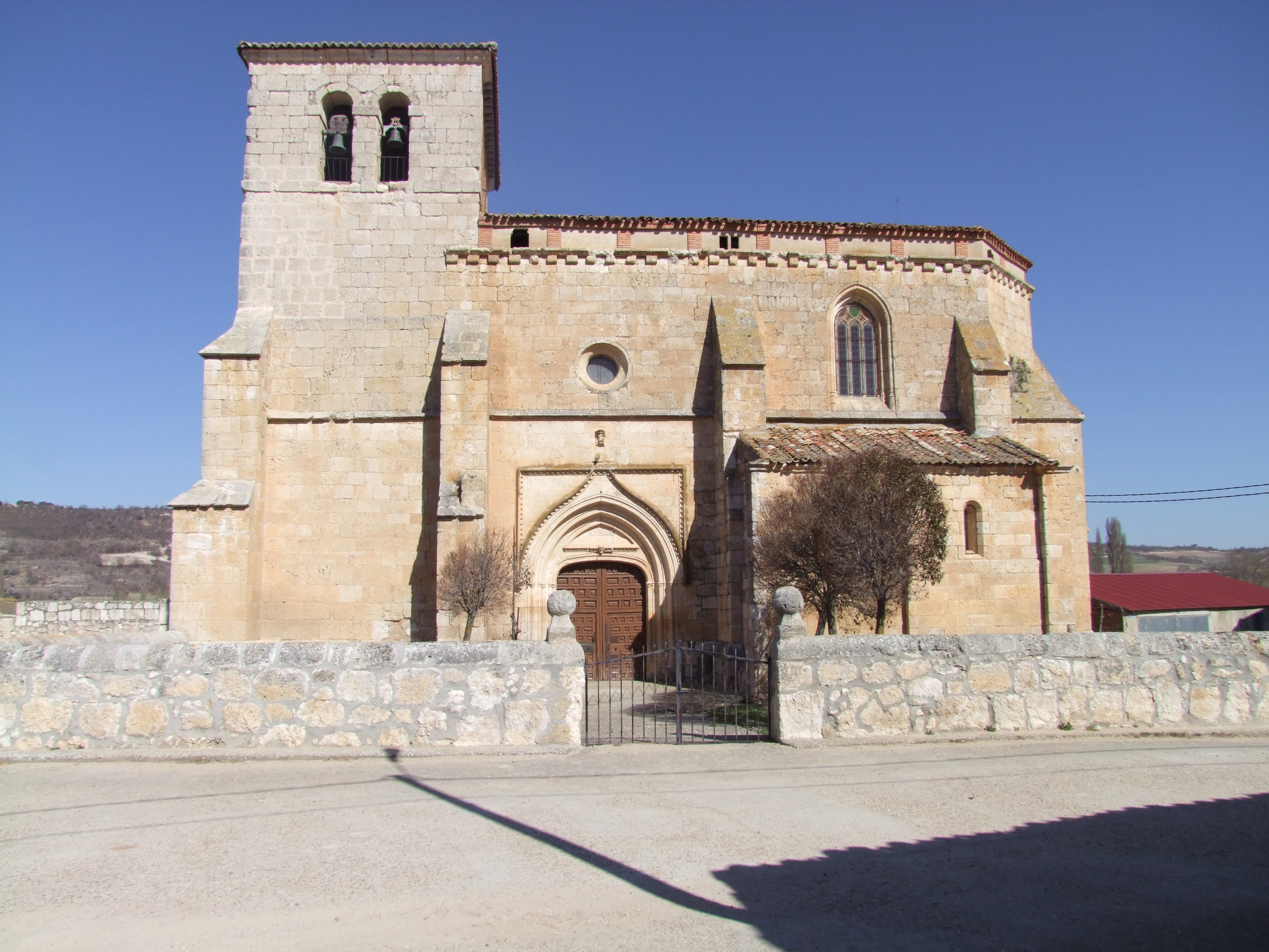 Iglesia de Villovela de Esgueva (Valladolid, Castilla y León)